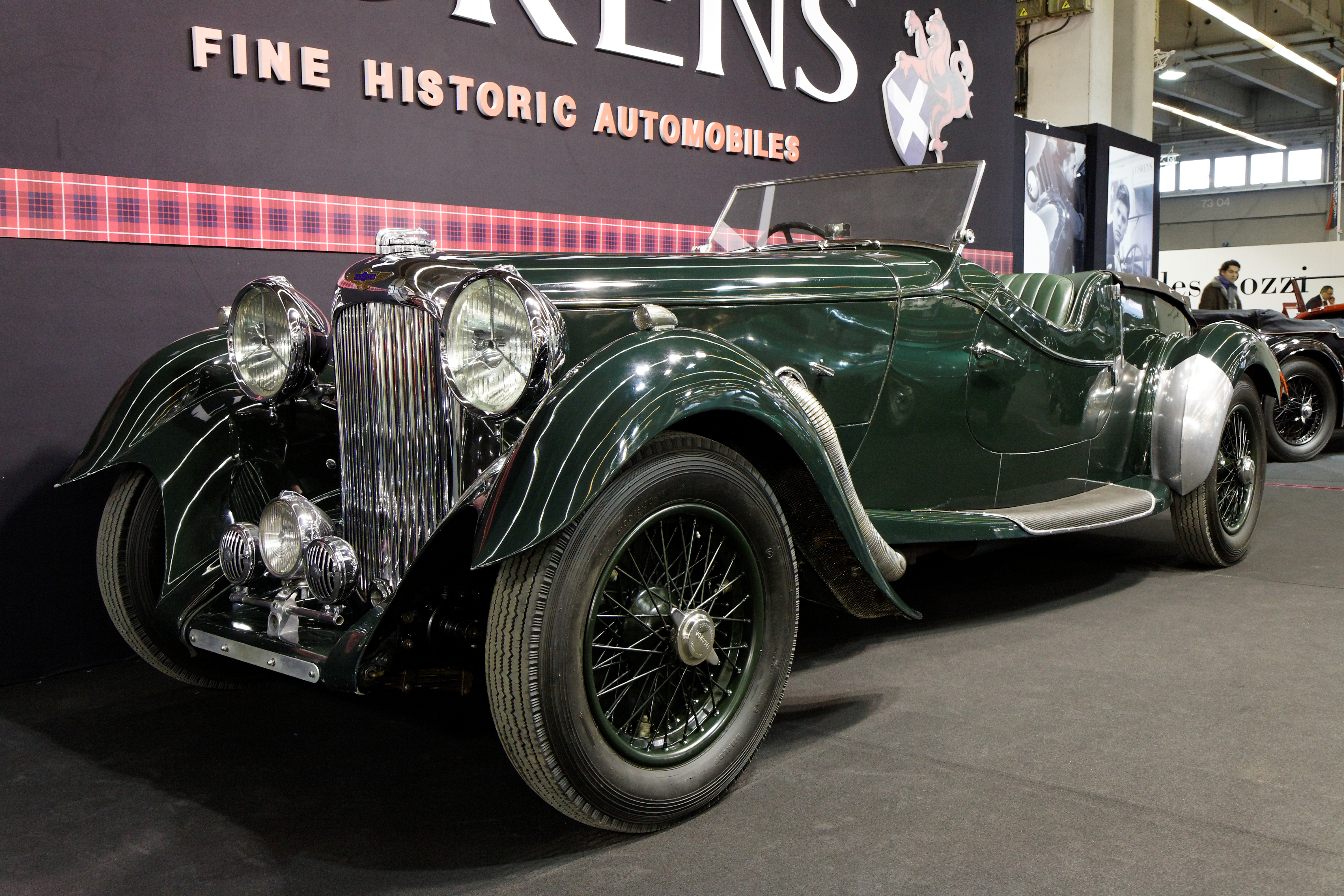 Photographie prise lors du salon rétromobile 2011 à Paris, porte de Versailles.